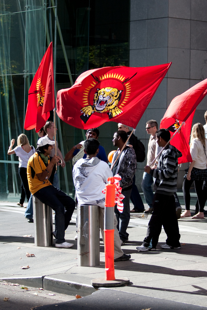 Upon leaving the launch I noticed these guys waving what I believe are Tamil Tiger flags